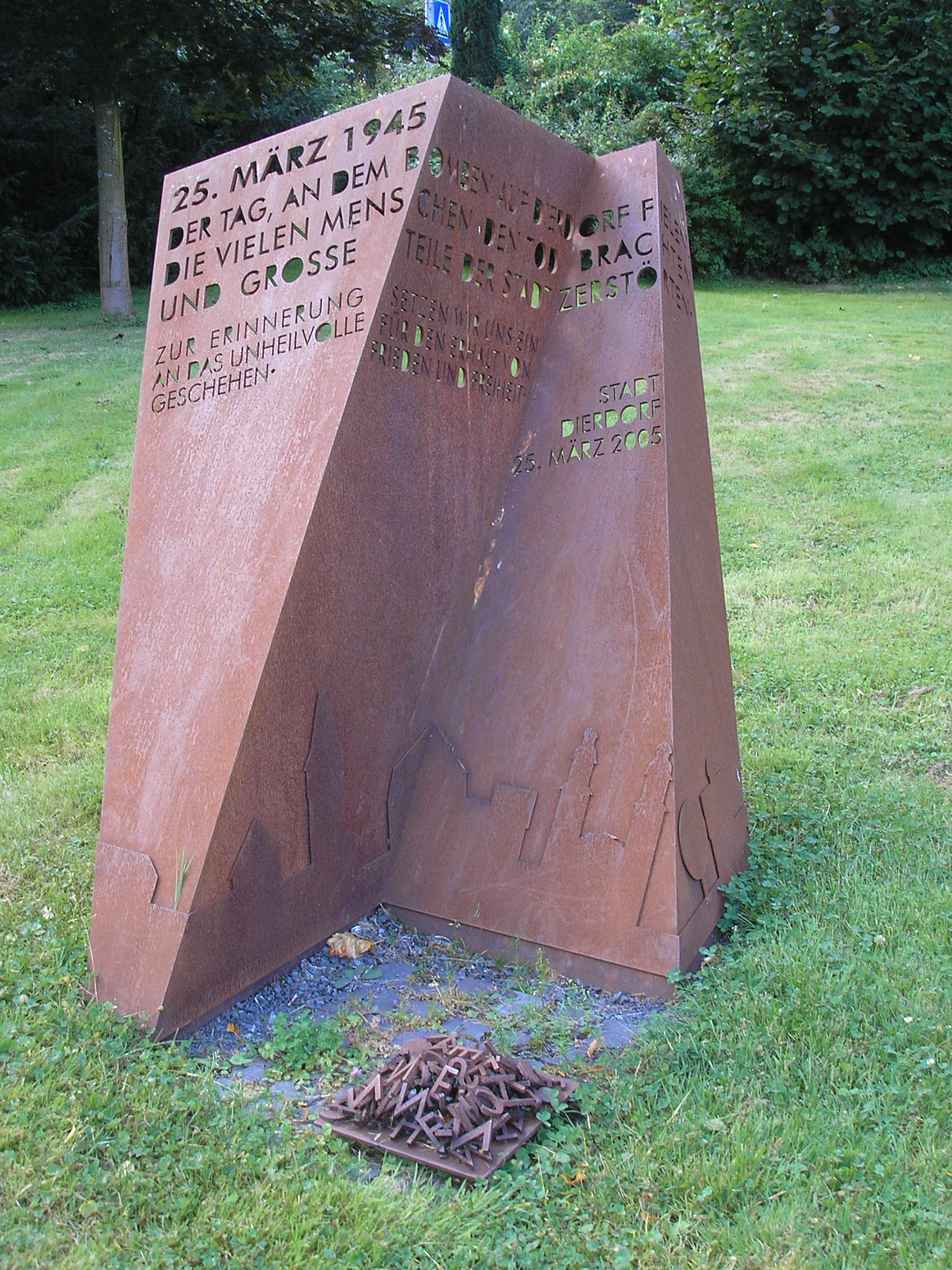 Mahnmal an die Zerstörung Dierdorfs am 25. März 1945